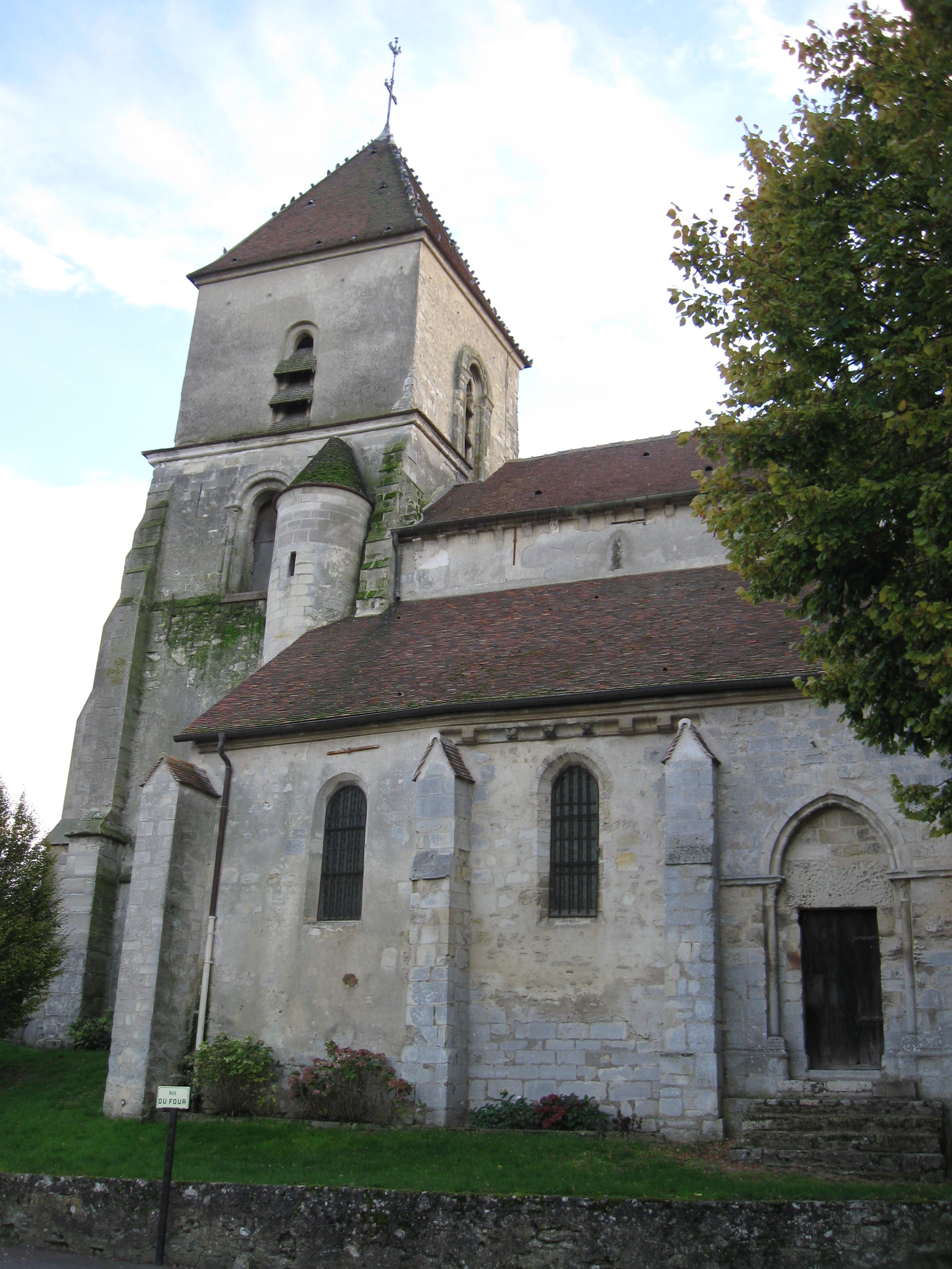 Église Saint-Maxime de Saint-Mesmes (façade nord). (département de la Seine-et-Marne, région Île-de-France).